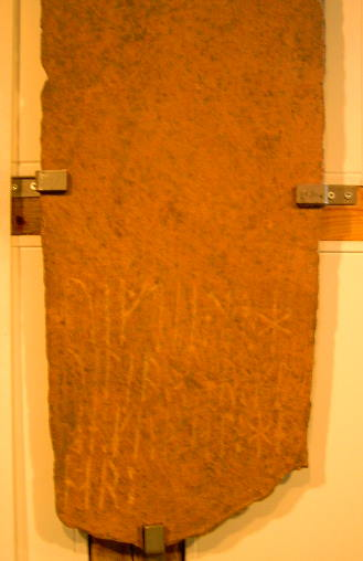 Grabstein mit Runen (Vigdis´Stein) aus der Wikingersiedlung Gardar auf Grönland, heute im Grönländischen Nationalmuseum Nuuk)